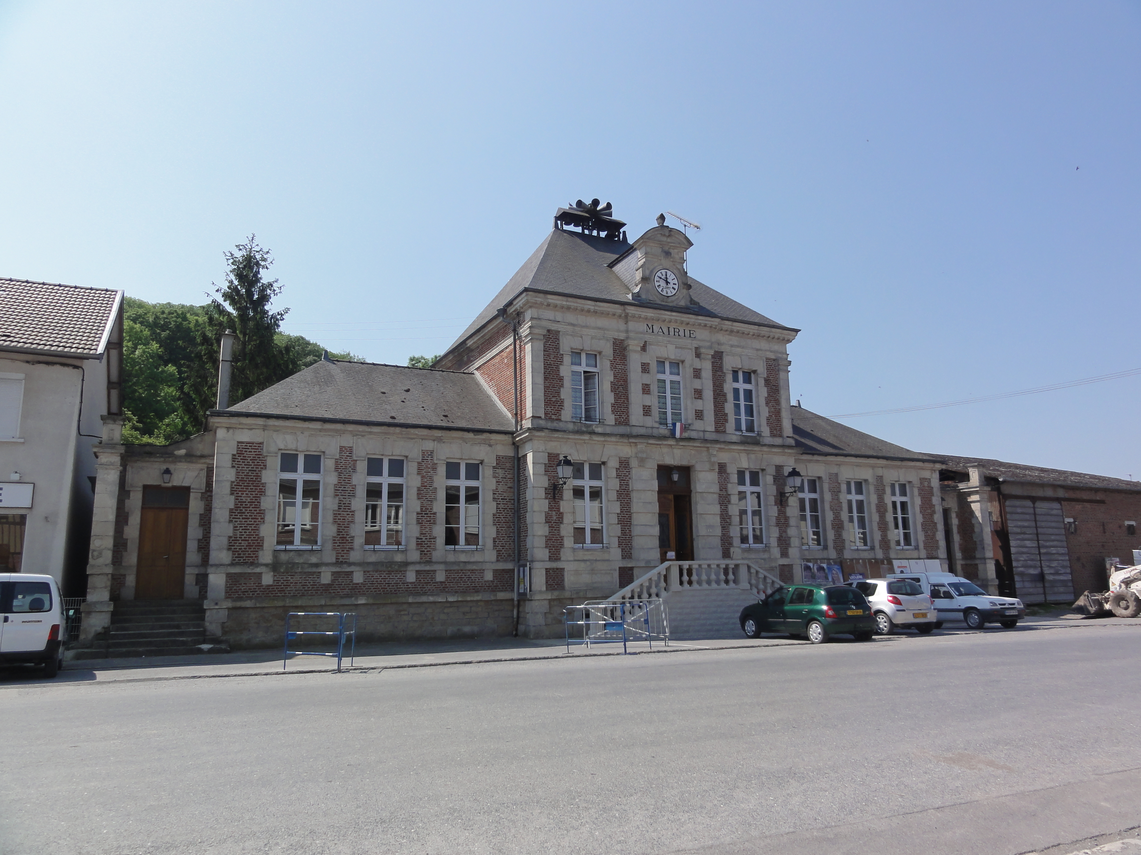 Chaumont-Porcien (Ardennes) Mairie